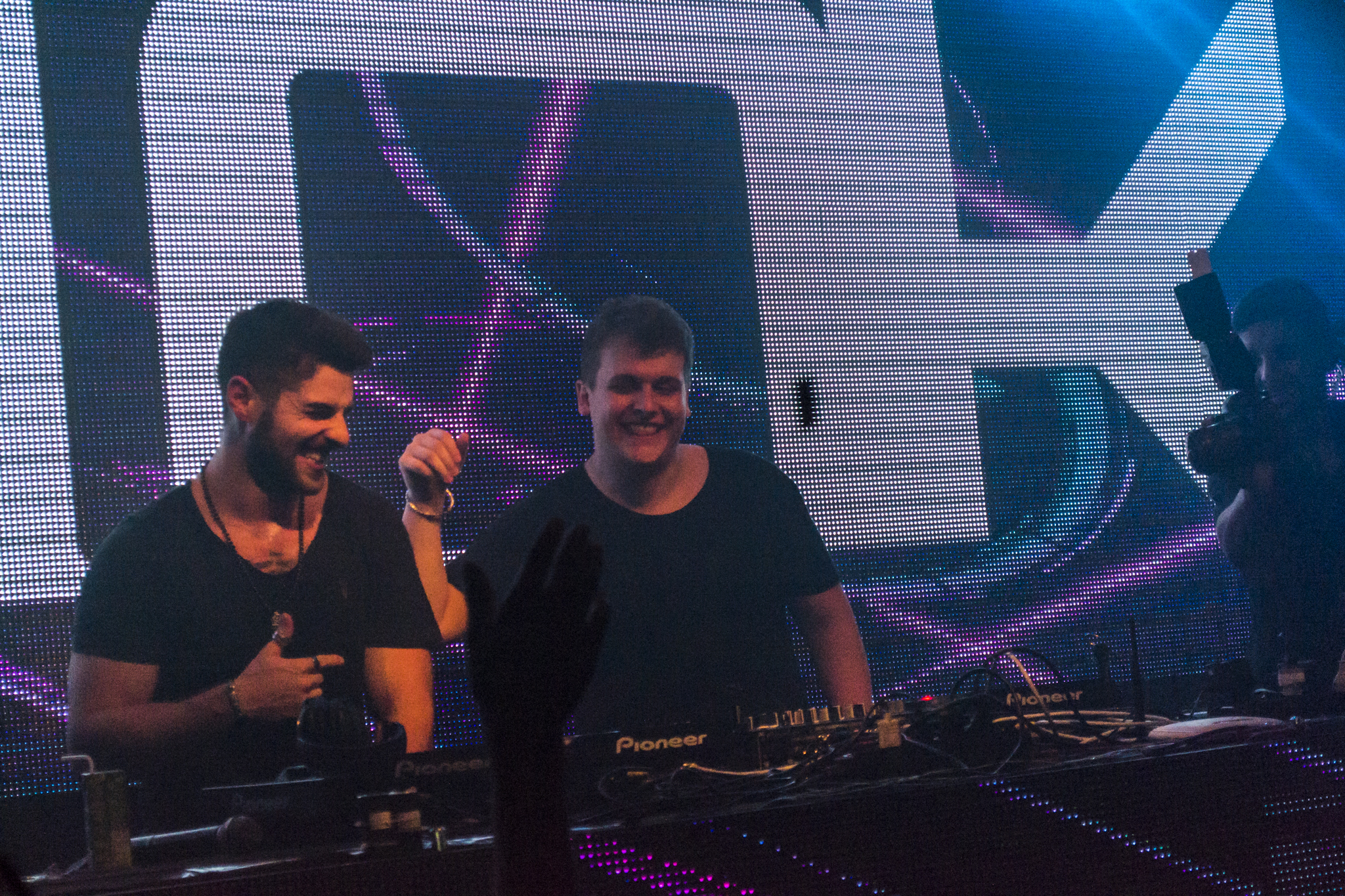 Alok e Bruno Martini no Lounge 037, Pará de Minas, MG.